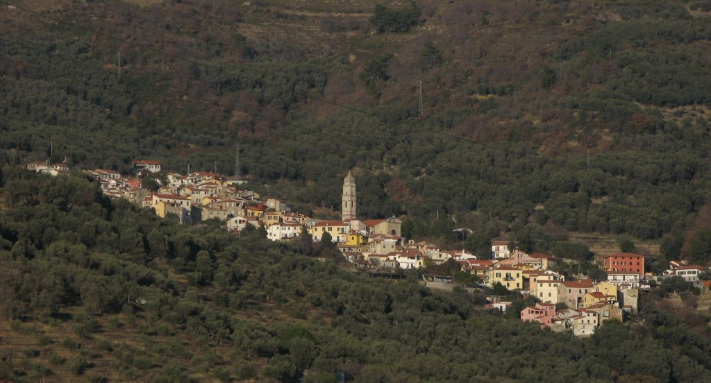 Frazione di Montegrazie, Imperia, Italy